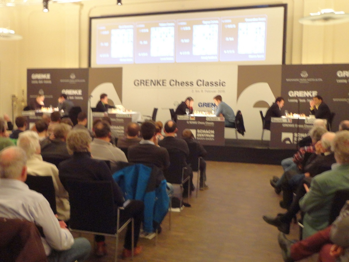 Turniersaal des GRENKE Chess Classic Baden-Baden 2015